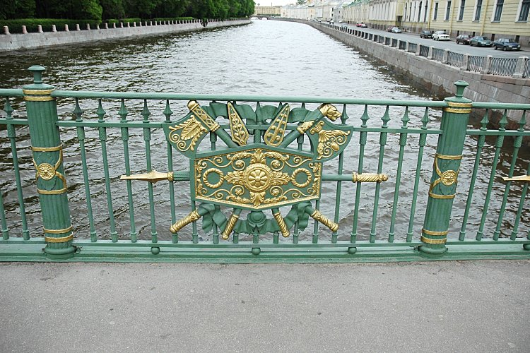 Panteleimonovskii bridge across Fontanka, St Petersburg (Russia), detail.